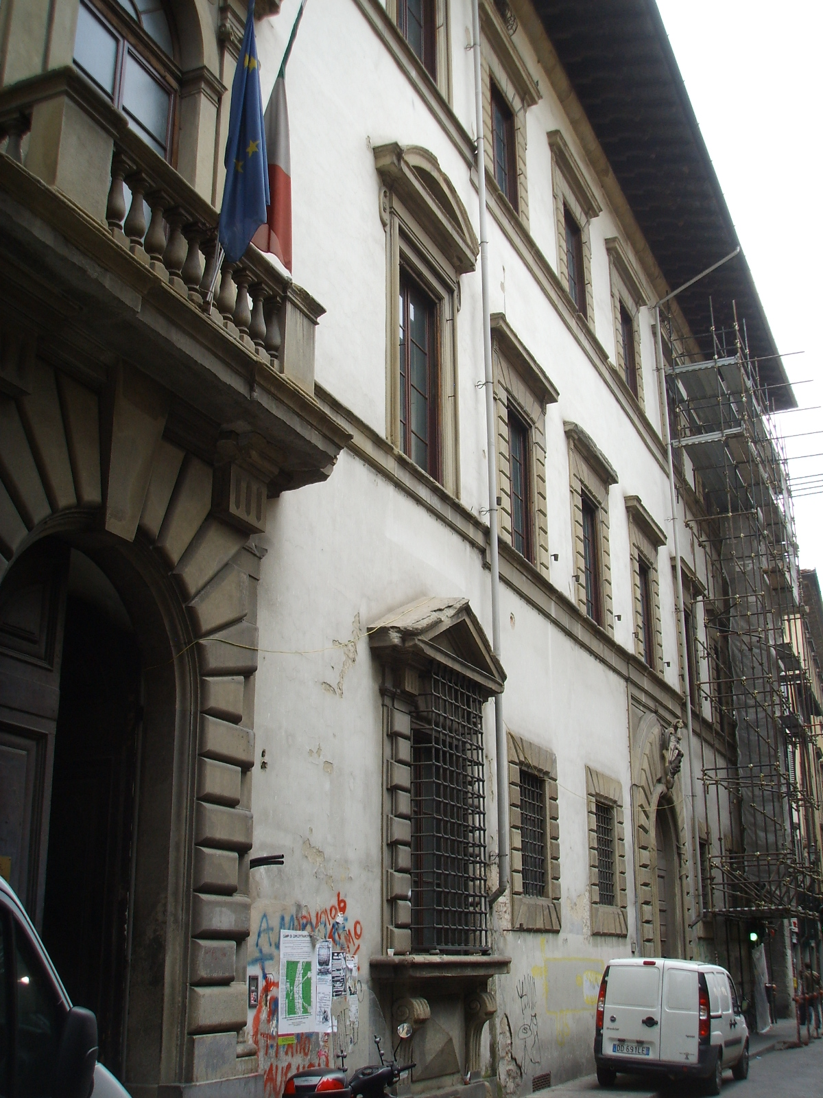 Palazzo rinuccini